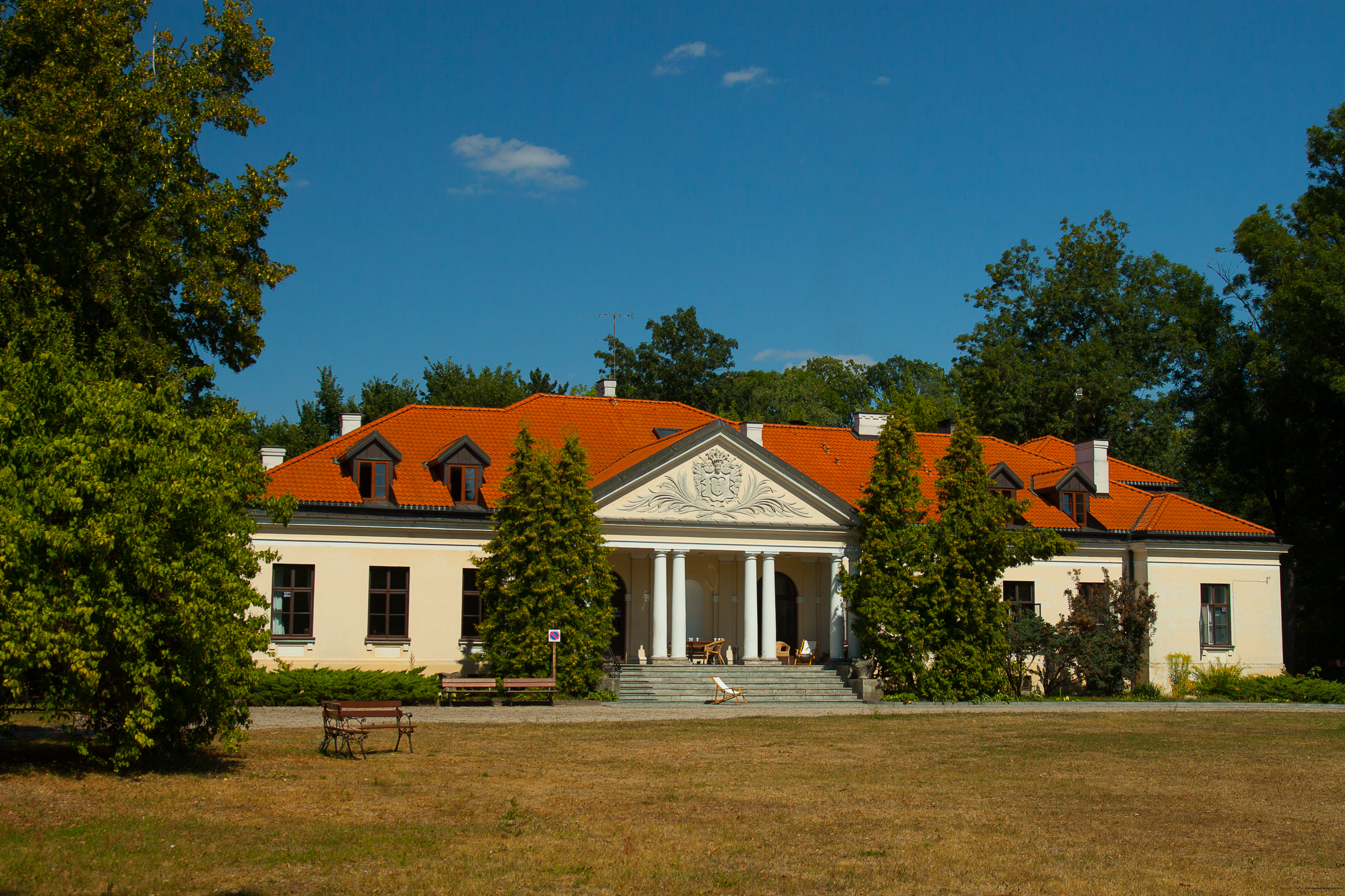 Dłużew, dwór, 1901